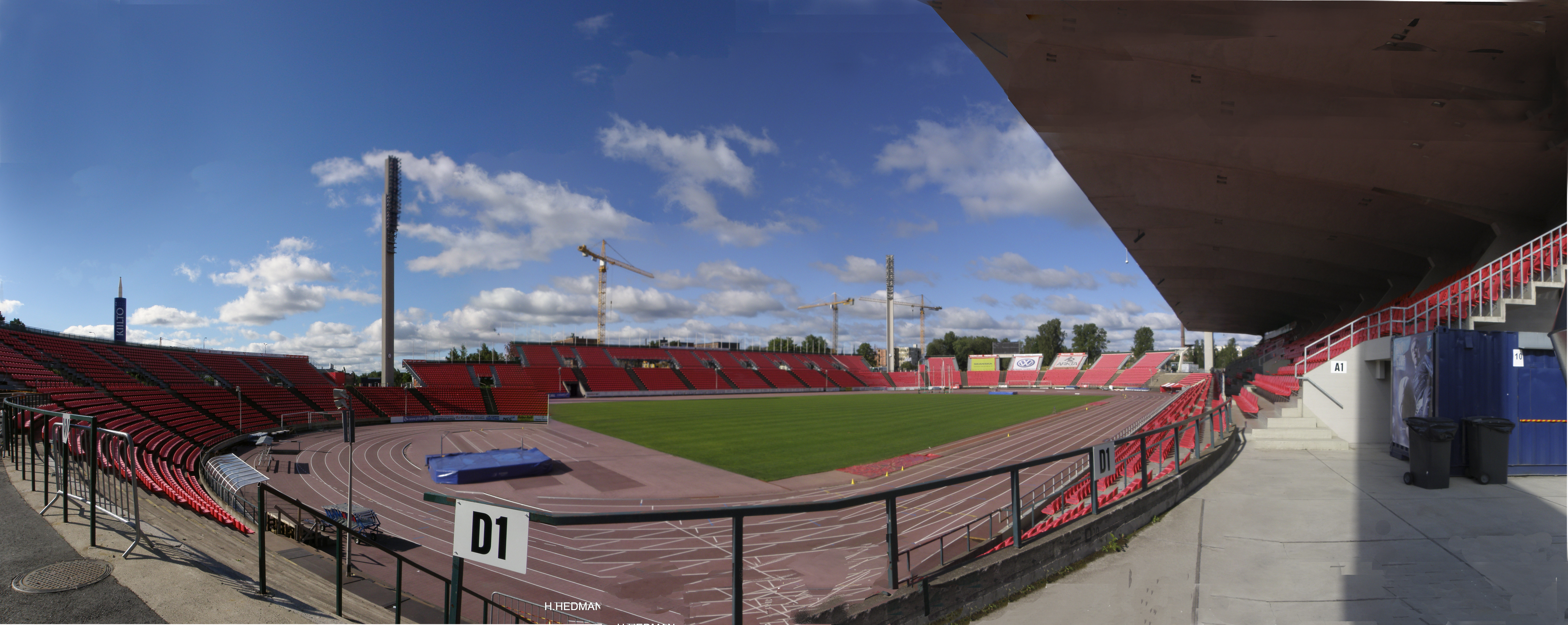 Tampere, Finland